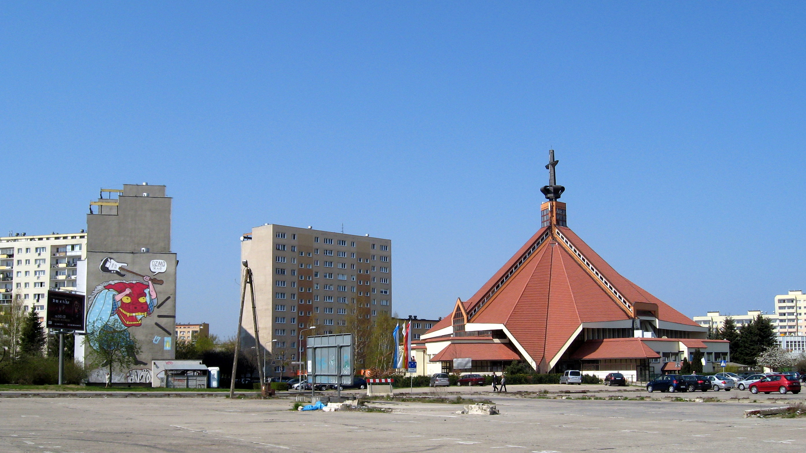 Kościół parafialny pw. św. Kazimierza Królewicza w Gdańsku Zaspie. Z lewej strony charakterystyczny dla Zaspy duży mural na ścianie bloku mieszkalnego (zob. zbliżenie muralu)